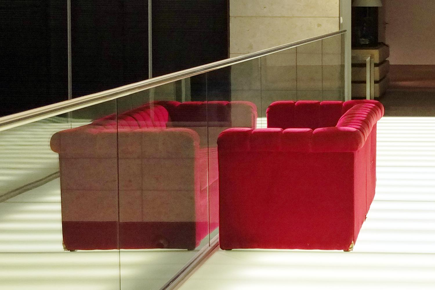 Horst Wackerbarths Rotes Sofa in Düsseldorf 2014